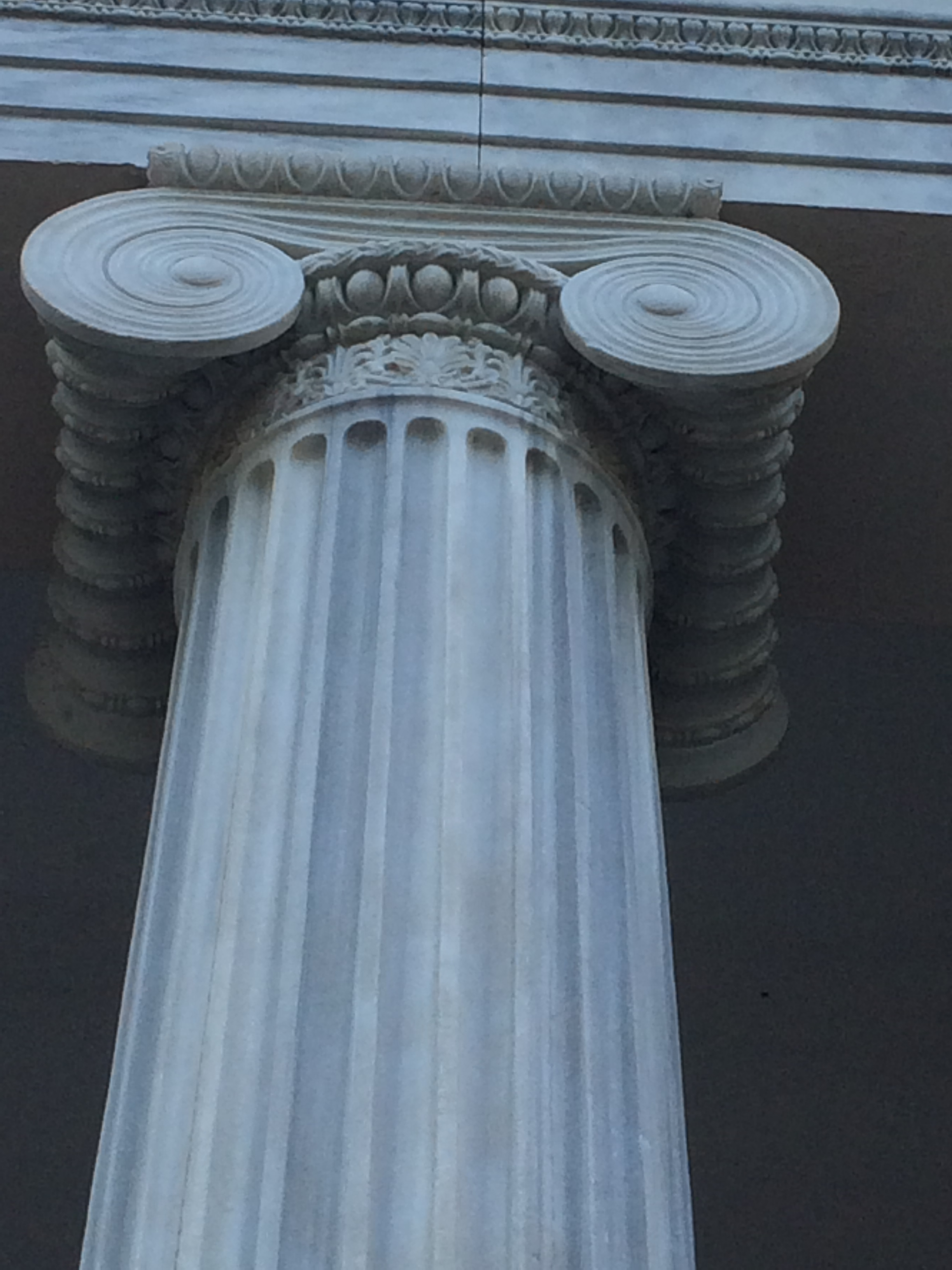 İyonik Kolon Başlığı Detayı